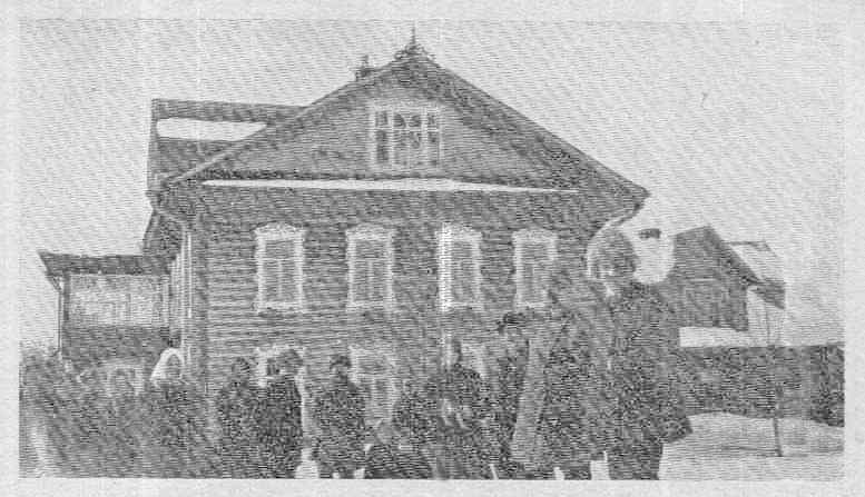 Трудовая комунна евангельских христиан "Вифания", Тверская область, 1928 год